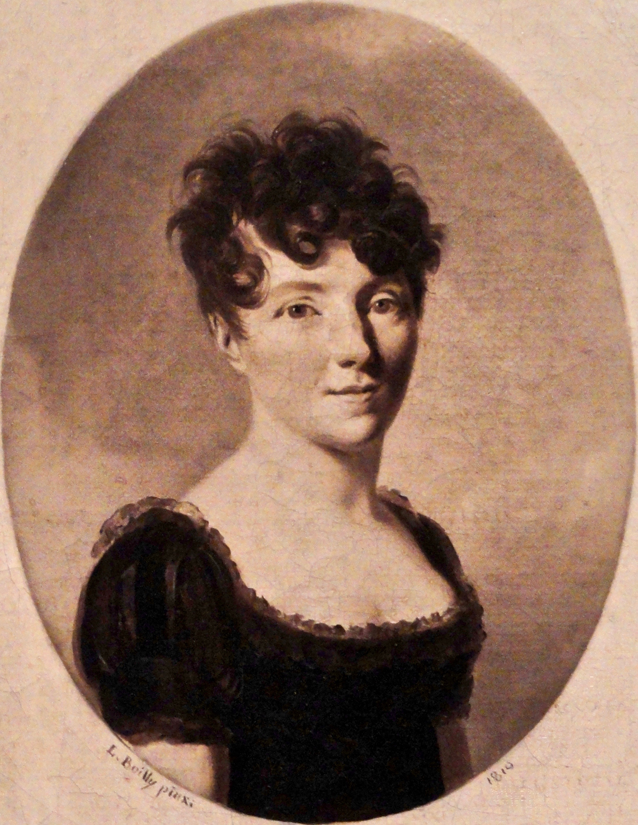 Louis-Leopold Boilly (1761–1845): Porträt der Schriftstellerin und Komponistin Sophie de Bawr (1773–1860). Öl auf Leinwand, 22 x 16 cm. Fogg Art Museum, Harvard University, Cambridge, Massachusetts.